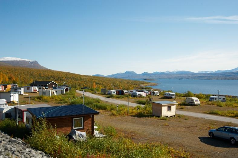 Fjällstation och campingplats. Laponia världsarv. Motiv: Ritsem Nyckelord: Riksintressen, Världsarv Kategori: Fjällmiljö, Nationalpark Fjällstation och campingplats. Laponia världsarv.